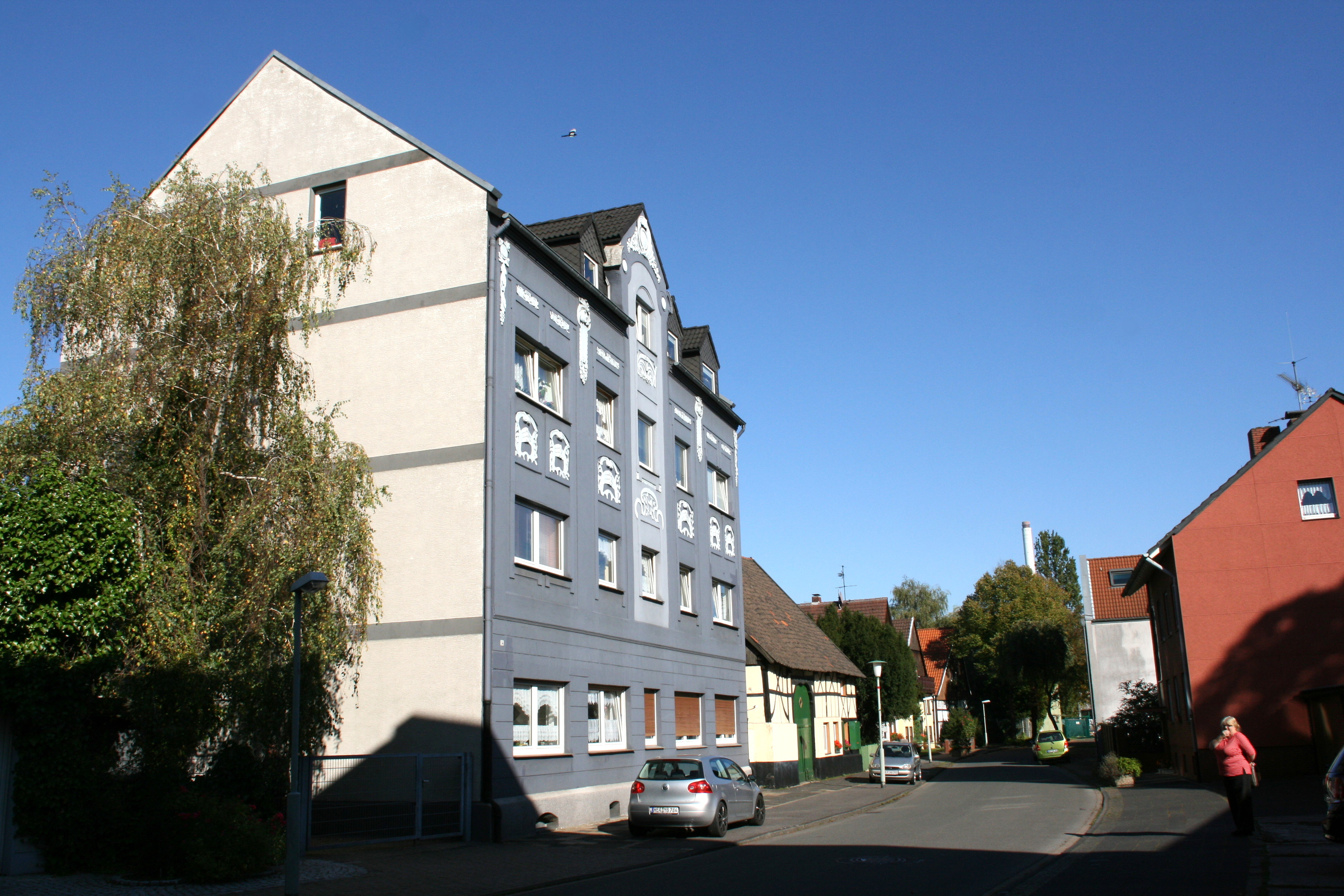 Altcrange in Herne-Crange